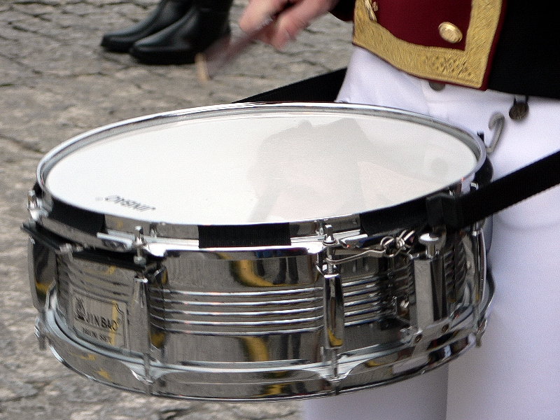 Percusión. Tamborileiro. Galicia